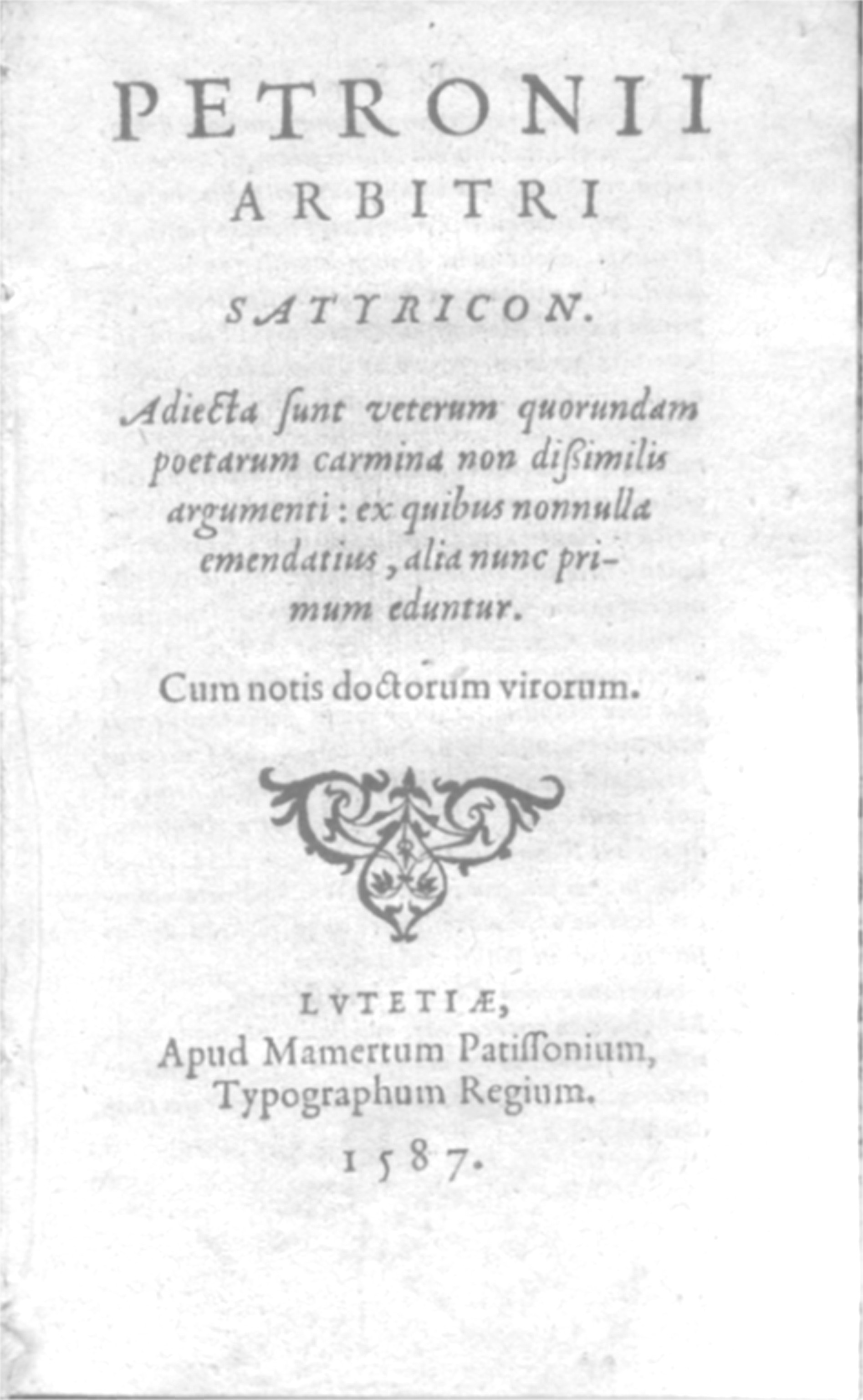 Satyricon-Ausgabe von Pierre Pithou, Paris, 1587 (= Schmeling/Stuckey Nr. 19), Titelblatt